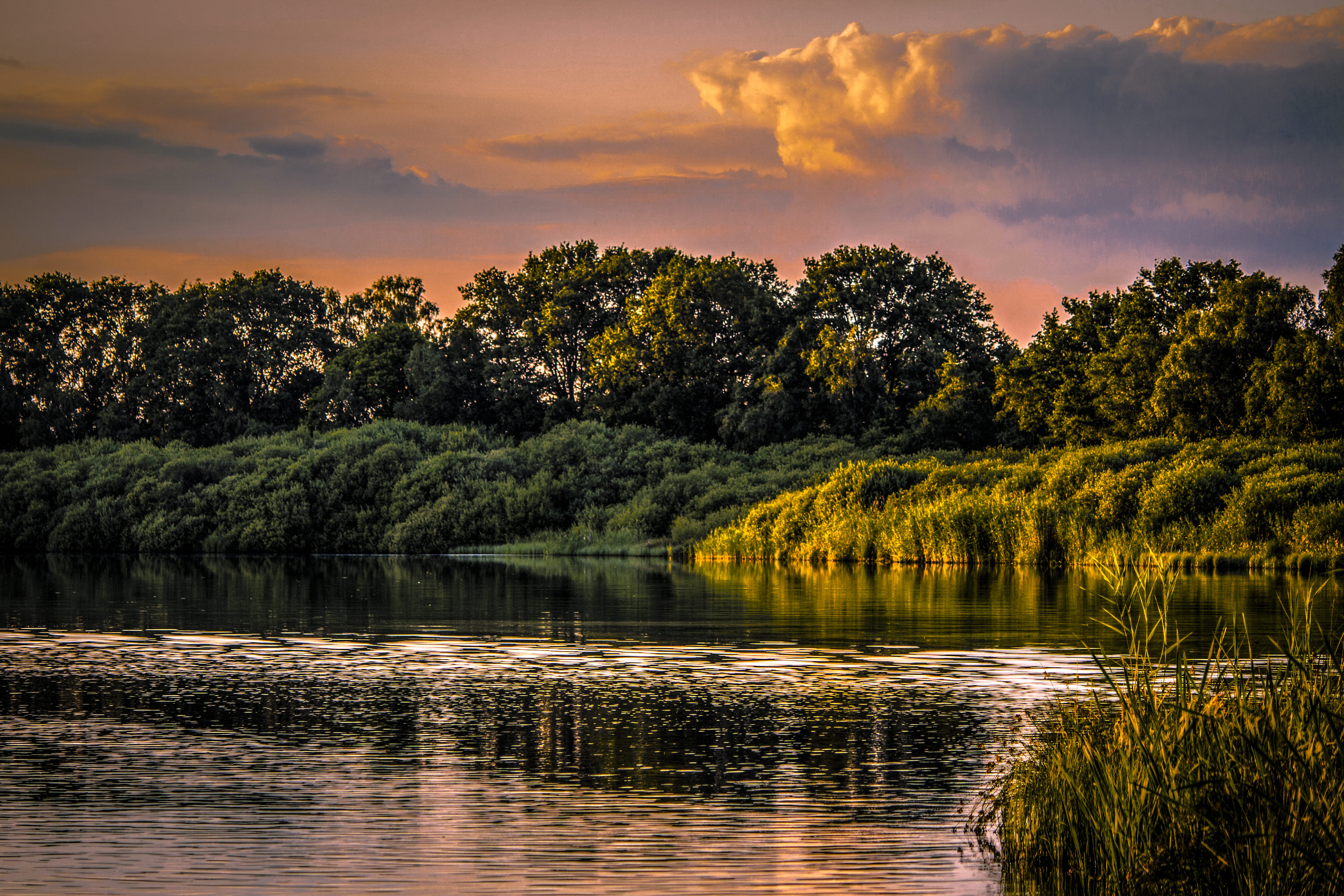 Das „Große Meer“ ist ein Naturschutzgebiet (NSG HA 012) in der niedersächsischen Gemeinde Eydelstedt im Landkreis Diepholz und liegt südöstlich von der Samtgemeinde Barnstorf.